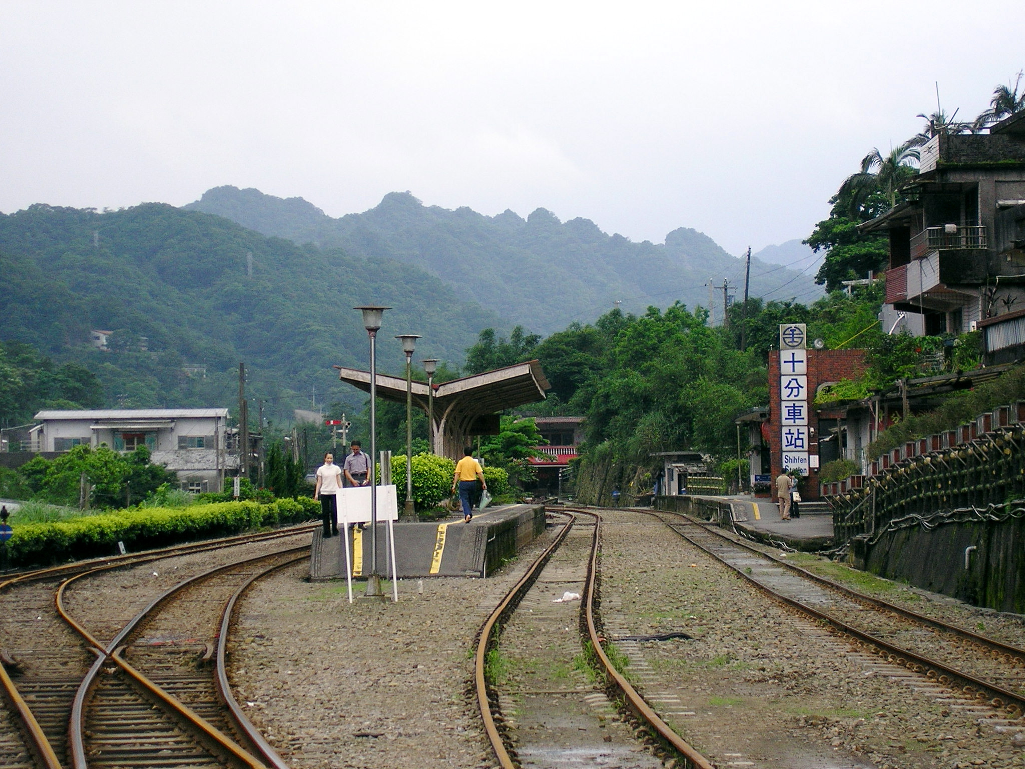 臺灣鐵路管理局十分車站月台。